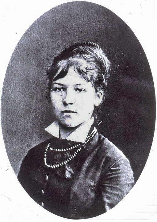 Marie Anne Hartmann (dite Marie Hart ) : [Buste, en méd. ov.]. Bibliothèque nationale et universitaire de Strasbourg